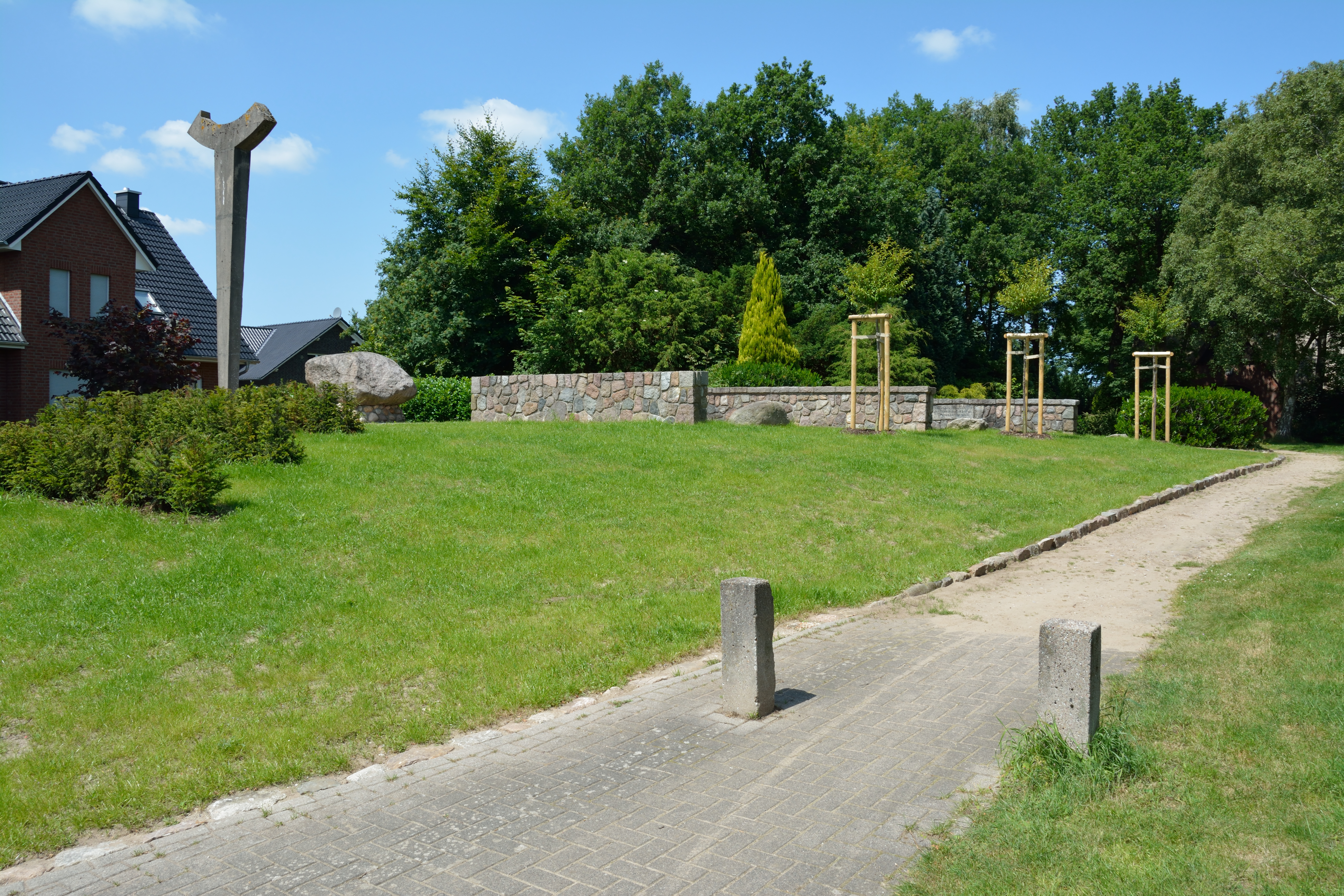 Das Ehrenmal am Friedhof